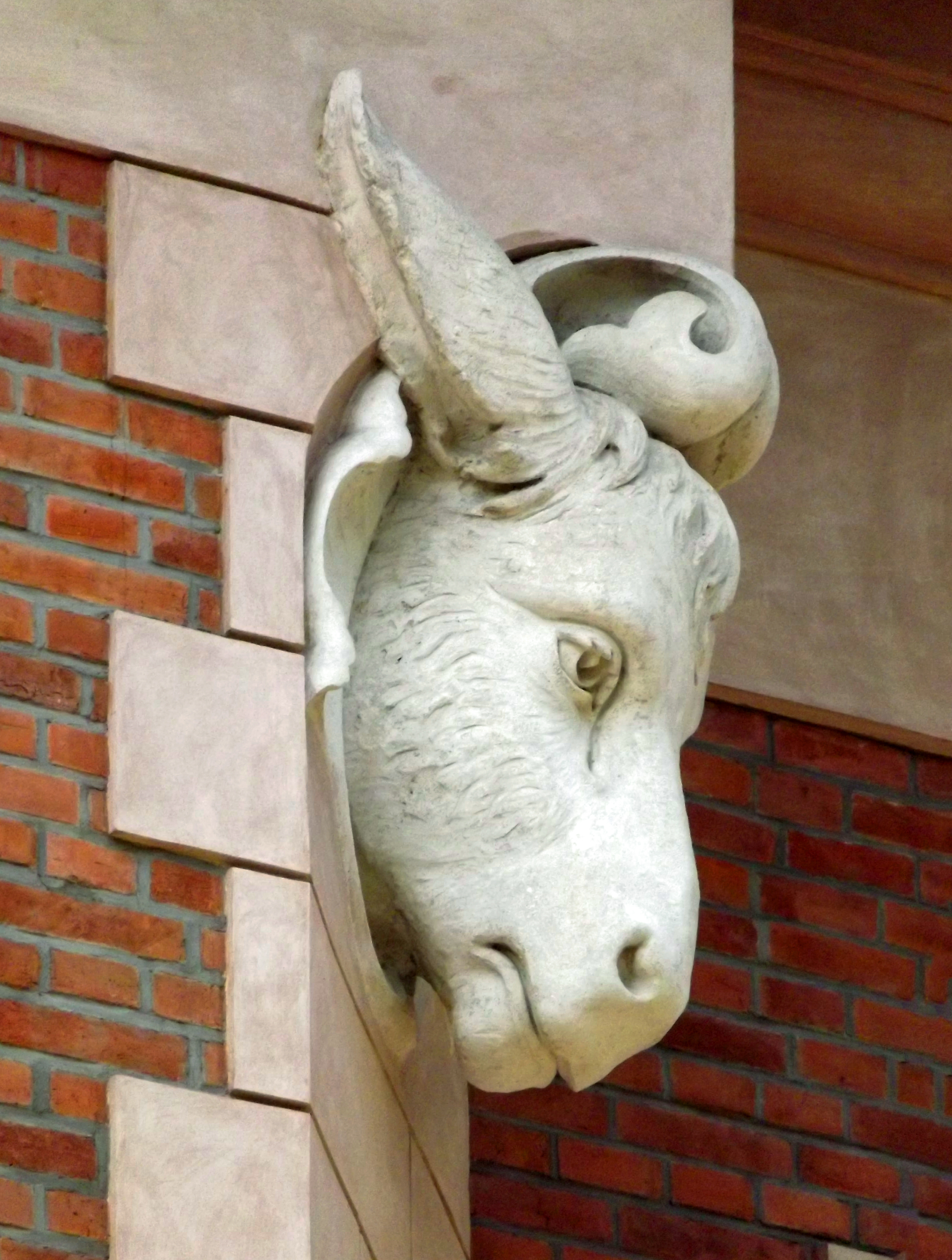 Kraków, ul. Retoryka 9, kamienica, 1891